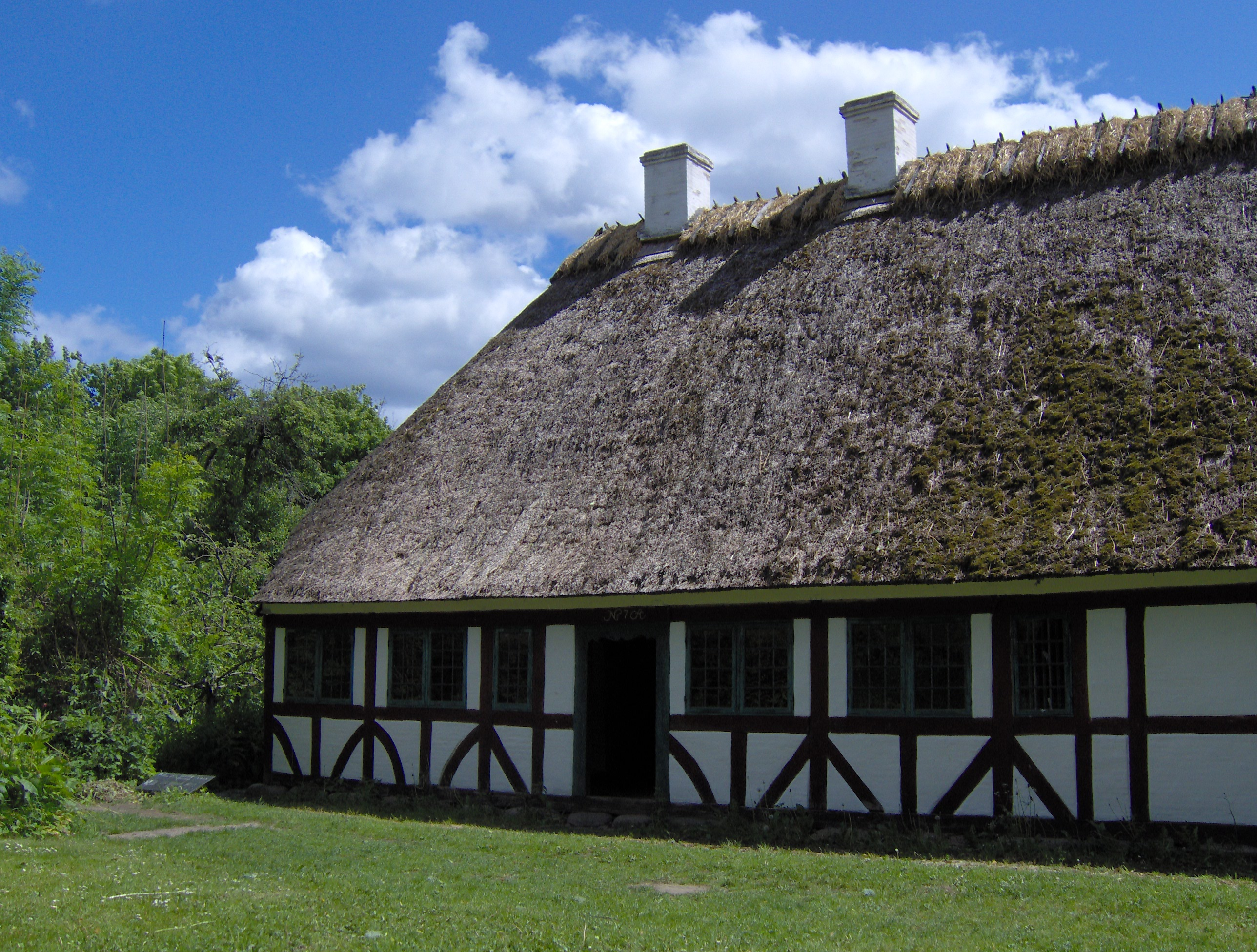 Fotograferet på Frilandsmuseet ved København